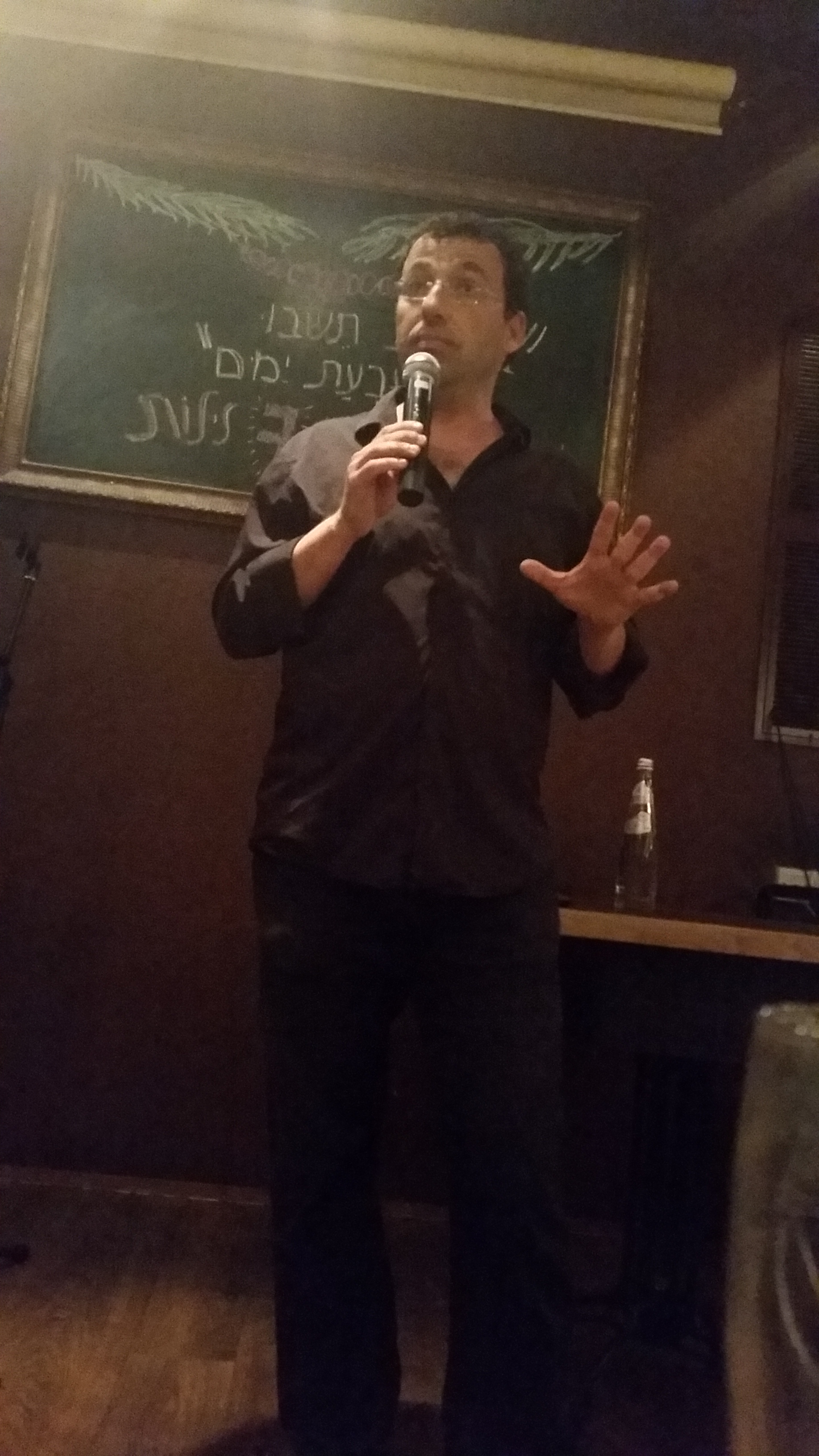 רביב דרוקר במהלך הרצאה בחיפה, 2016